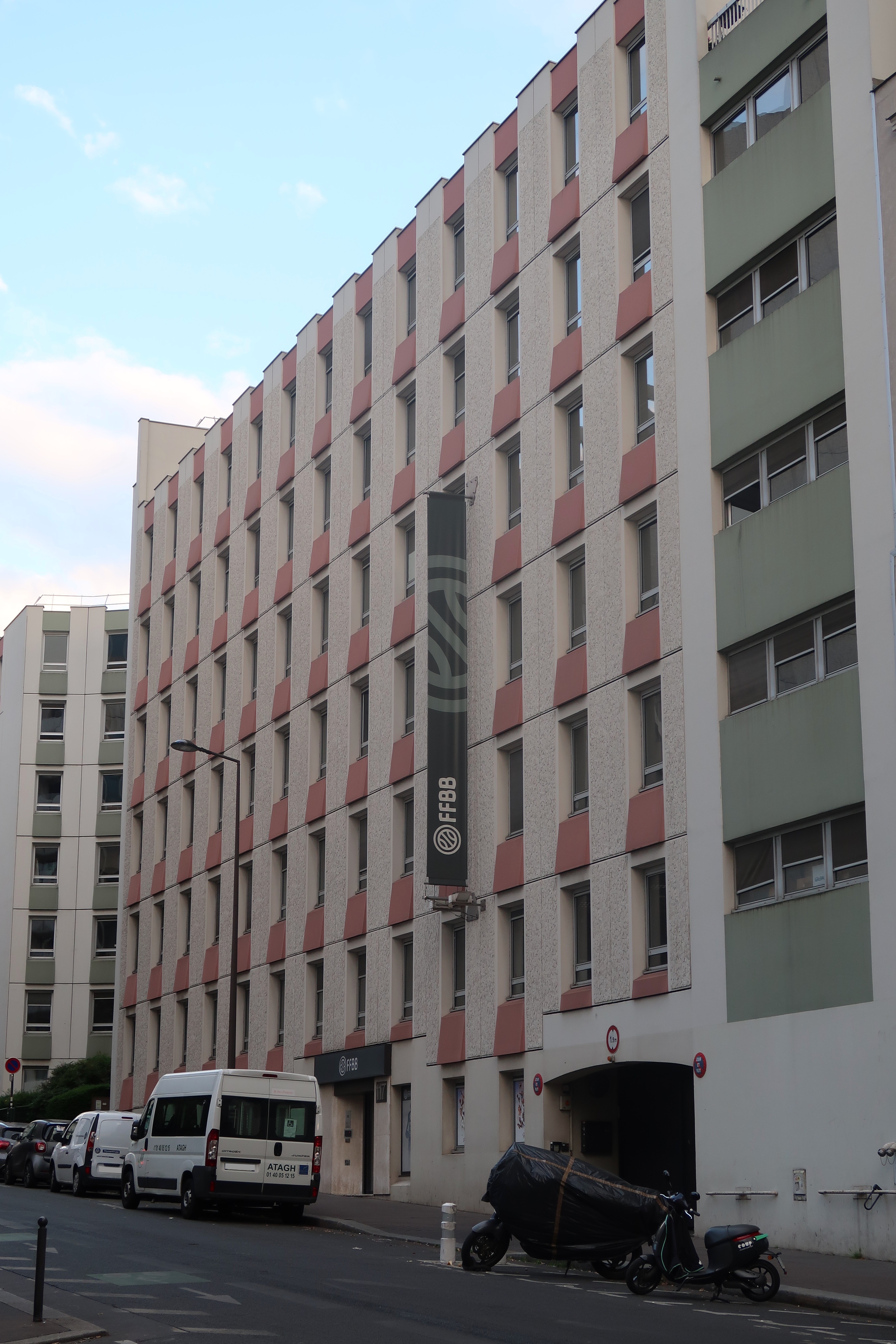 Siège de la Fédération française de basket-ball, 117 rue du Château-des-Rentiers (Paris, 13e).